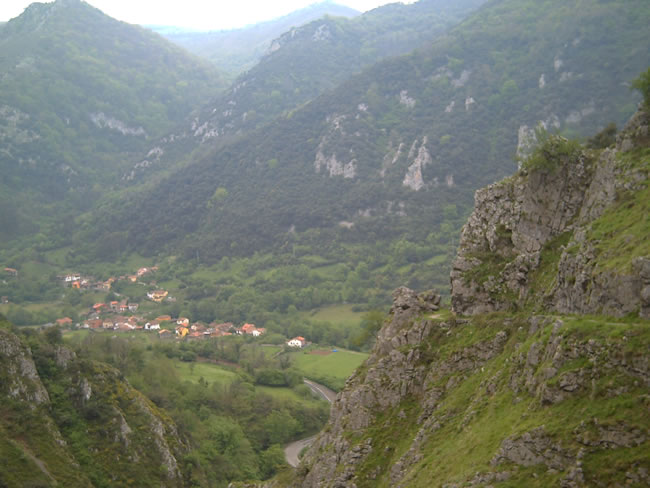 Desfiladero de las Xanas